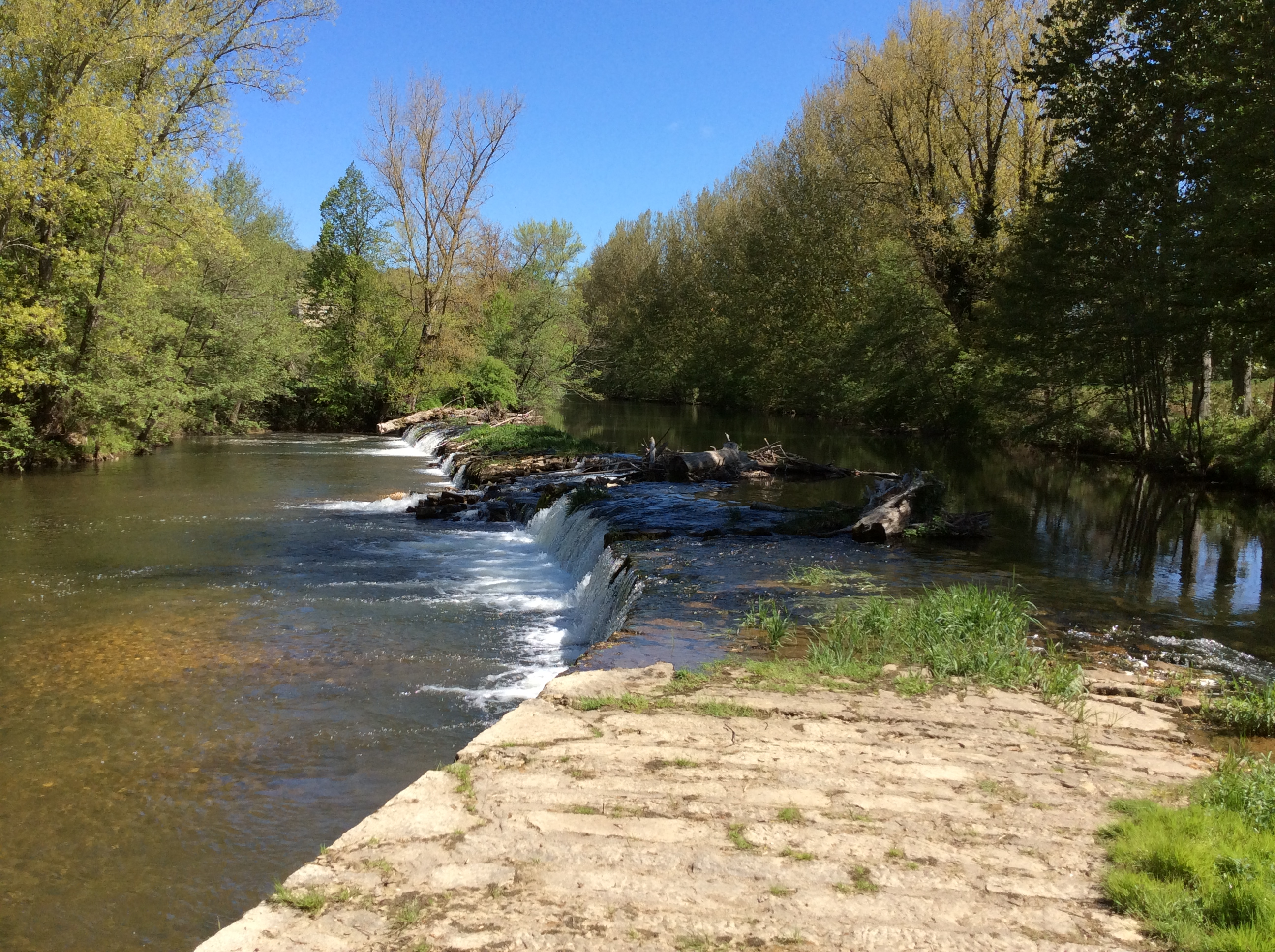 Les bords du Lot à Chanac